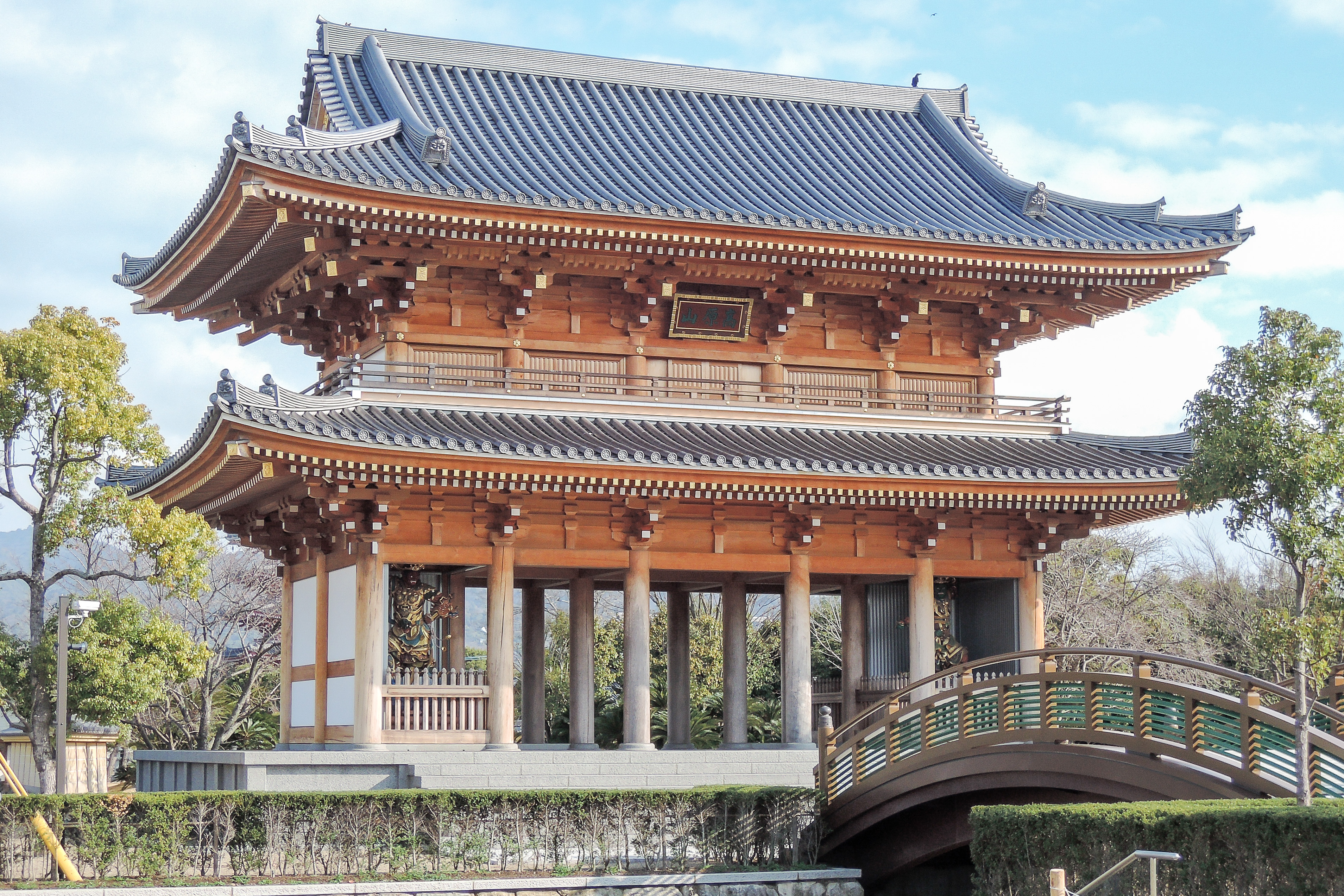 平成23年5月23日落慶の南大門